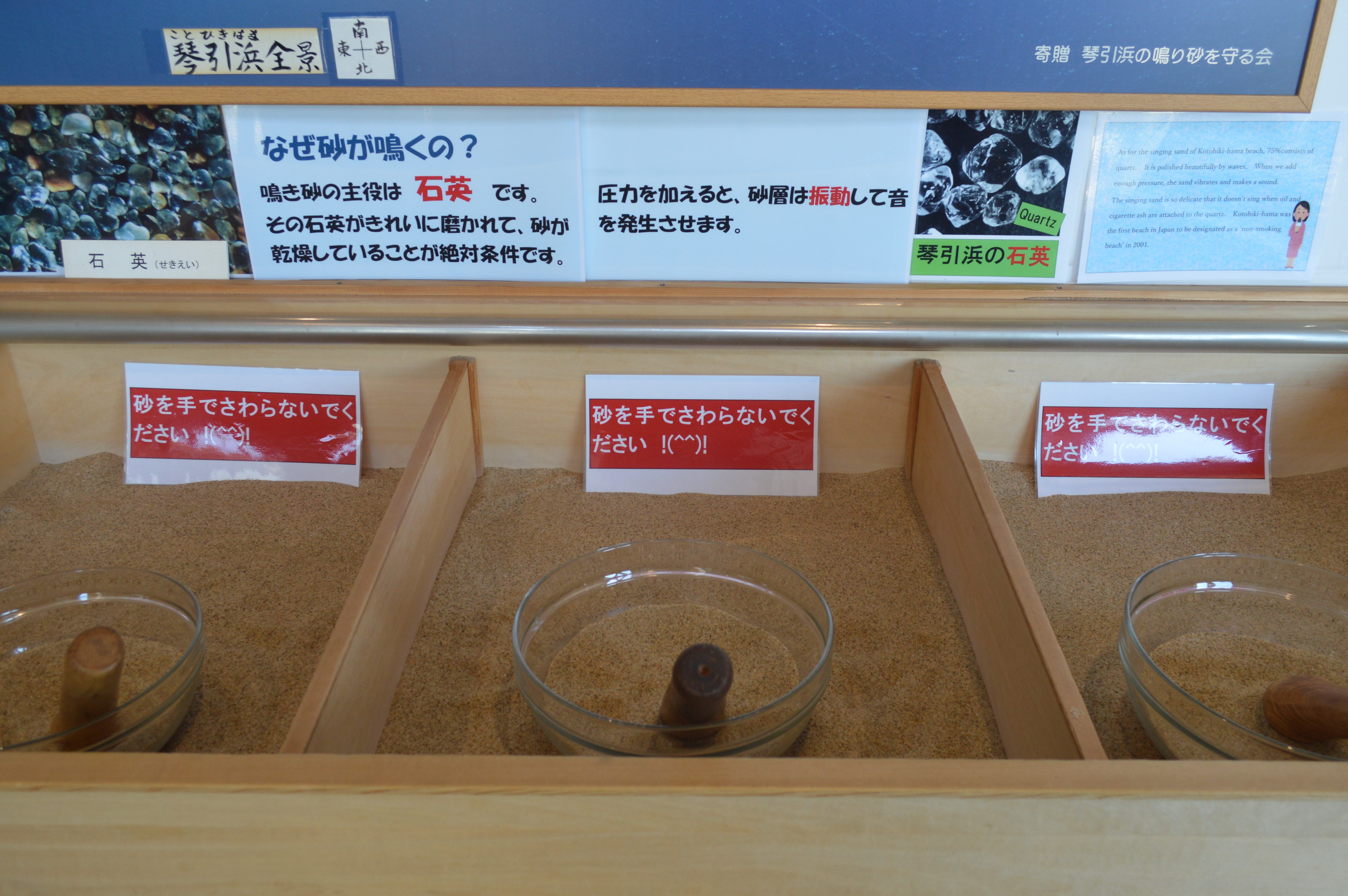 京都府京丹後市網野町にある琴引浜鳴き砂文化館。1階にある鳴き砂体験コーナー。